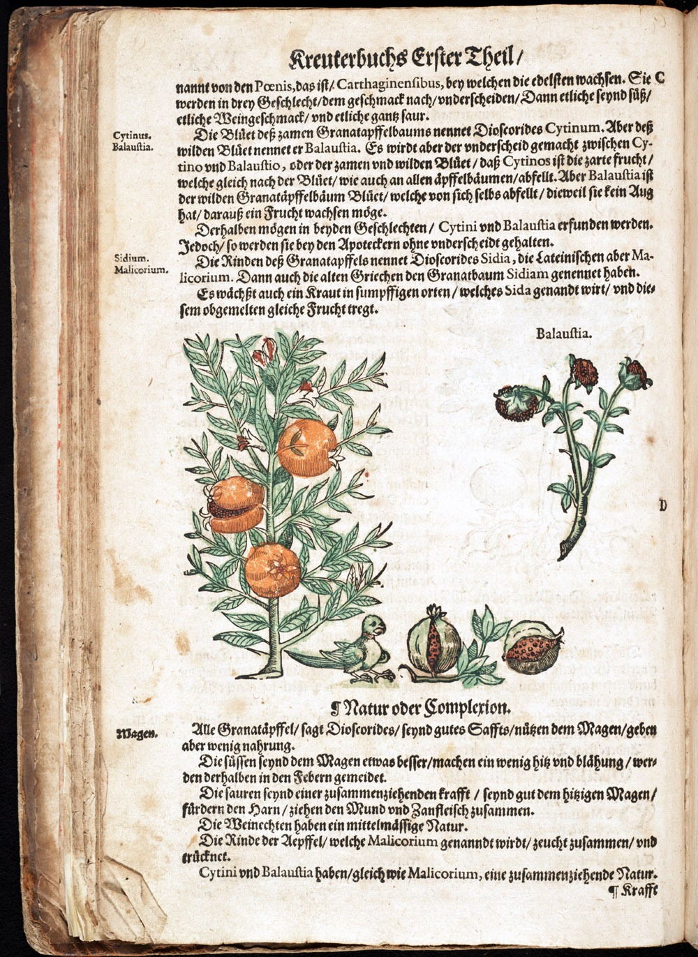 Page from Kreuterbuch